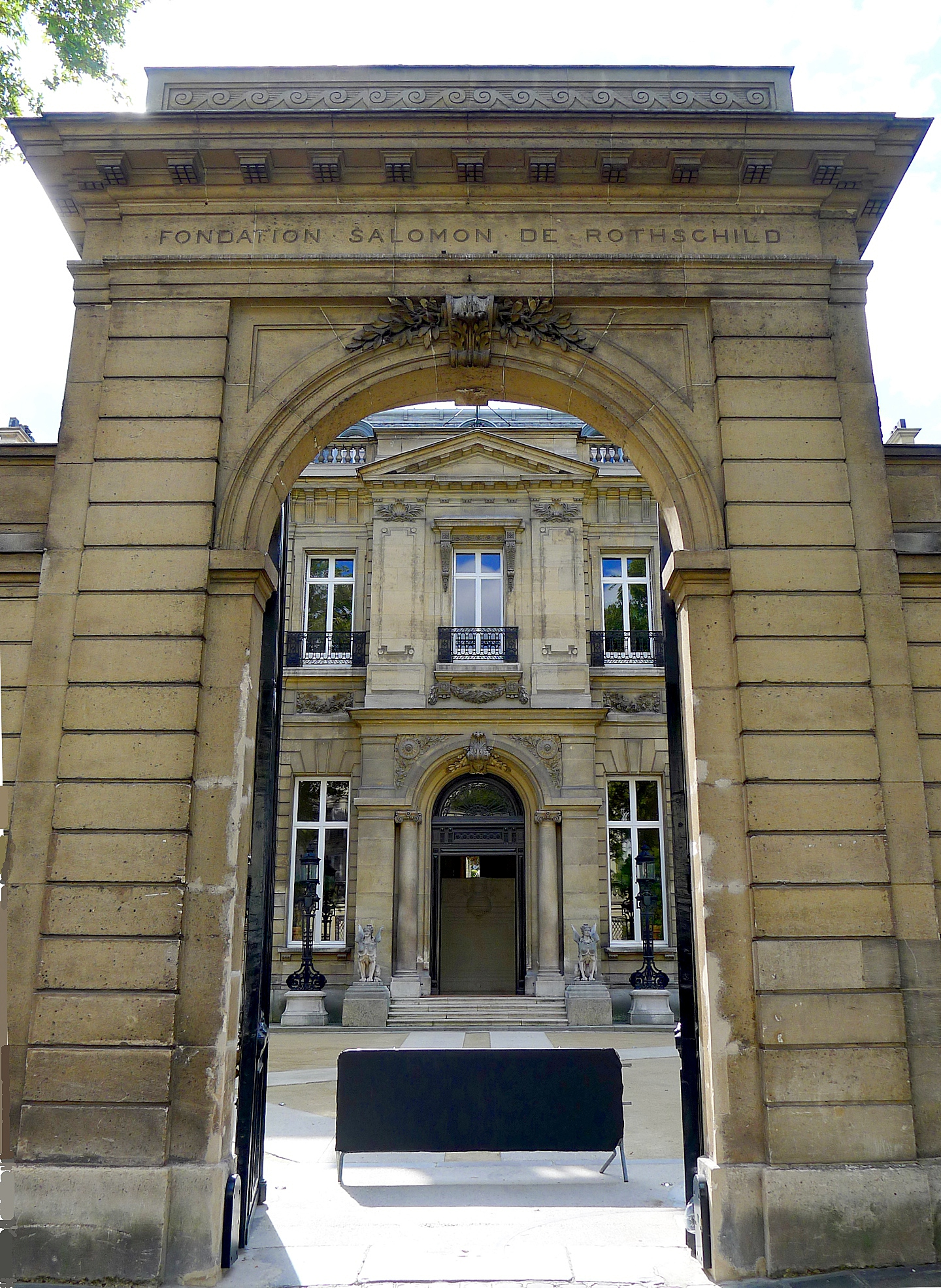 Hôtel Salomon de Rothschild (n°11 rue Berryer, Paris VIII)